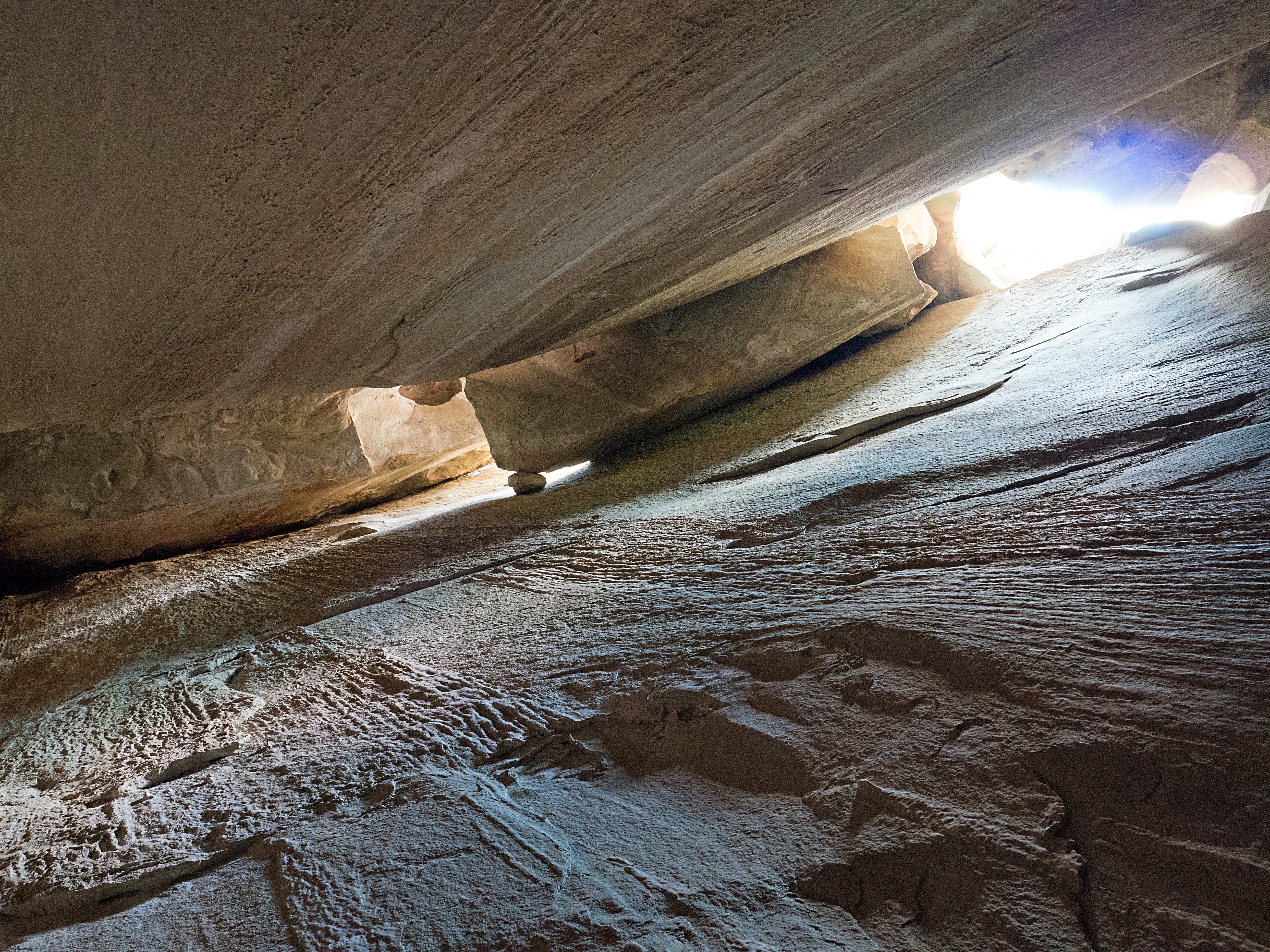 La chambre du Roi dans le massif de grès d'Annot